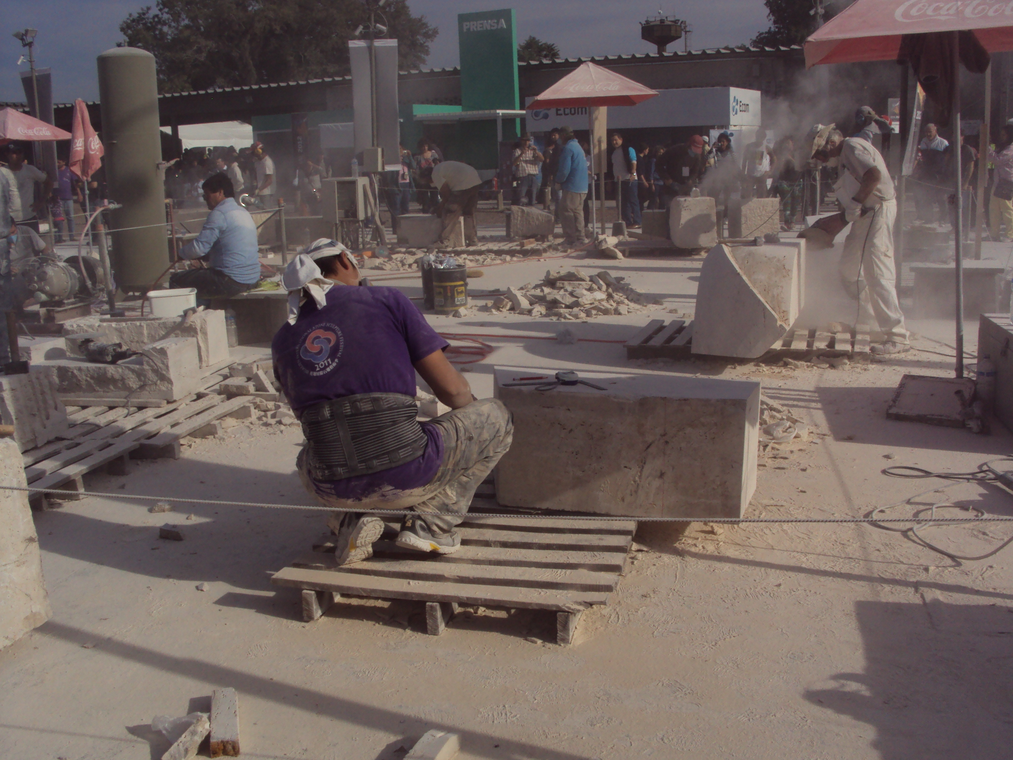 Bienal 2012, artistas trabajando